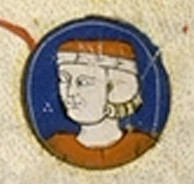 Jean Tristan de France